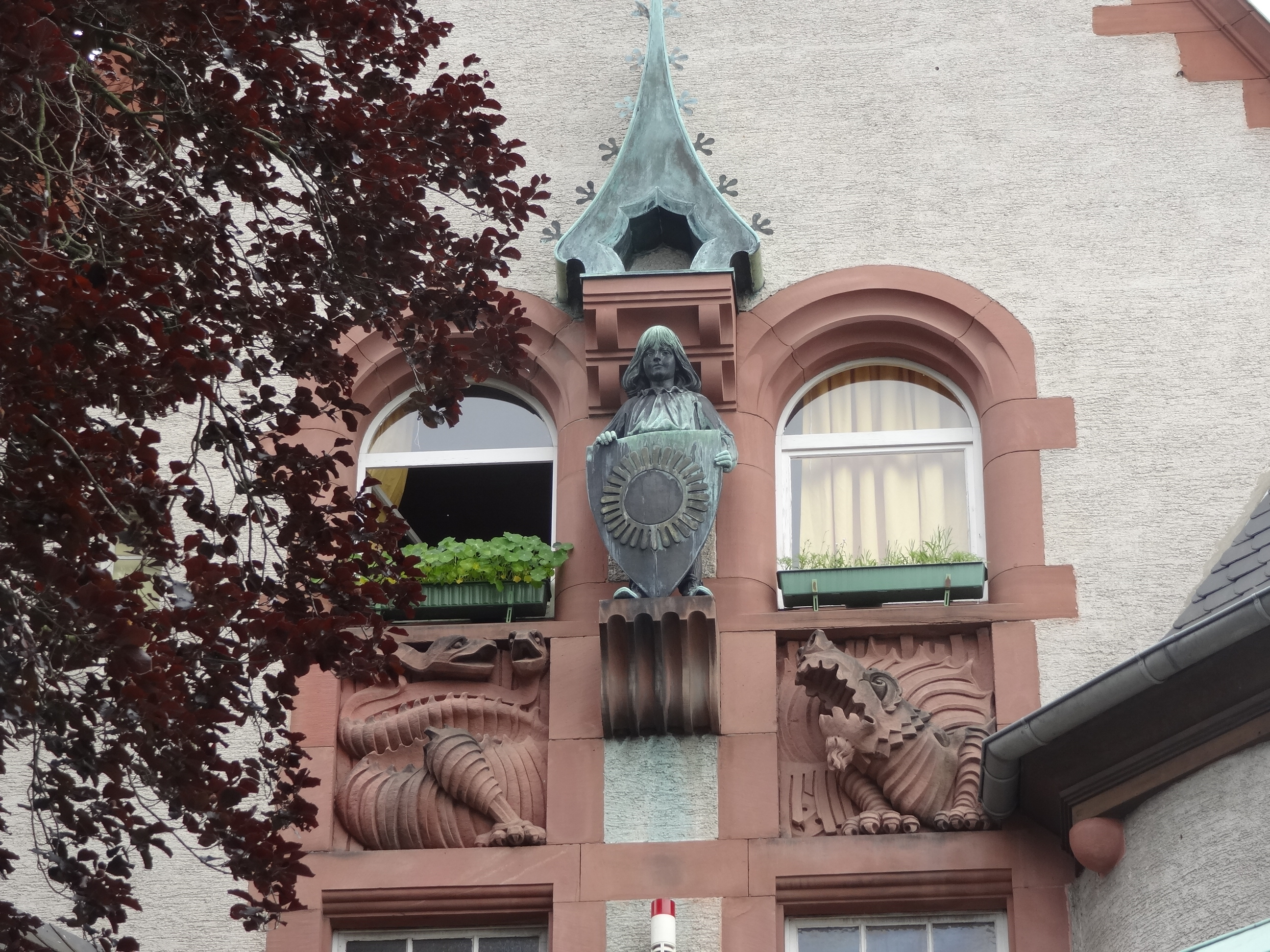 Haus Haardteck, Herdweg 79 in Darmstadt